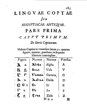 Auszug aus Athanasius Kirchers "Prodromus Coptus", Seite 283]